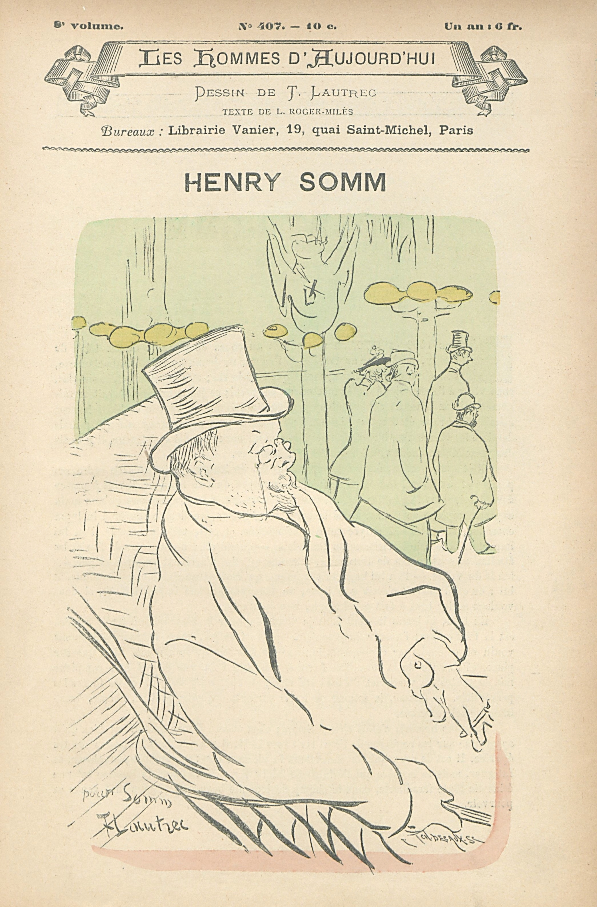 Caricature d'Henry Somm par Henri de Toulouse-Lautrec. Les Hommes d'Aujourd'hui n°407, 1892.